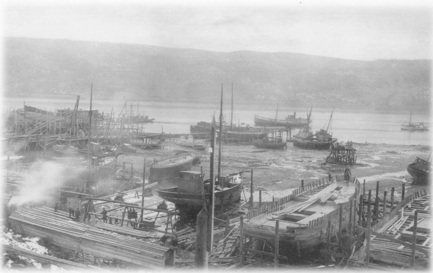 Верфь деревянного судостроения (ныне Судоверфь), 1928 г.